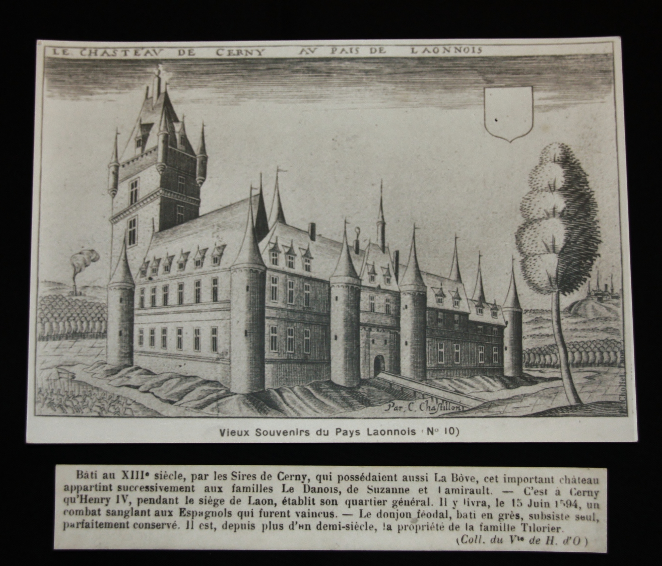 tel était le Château de Cerny-les-Bucy